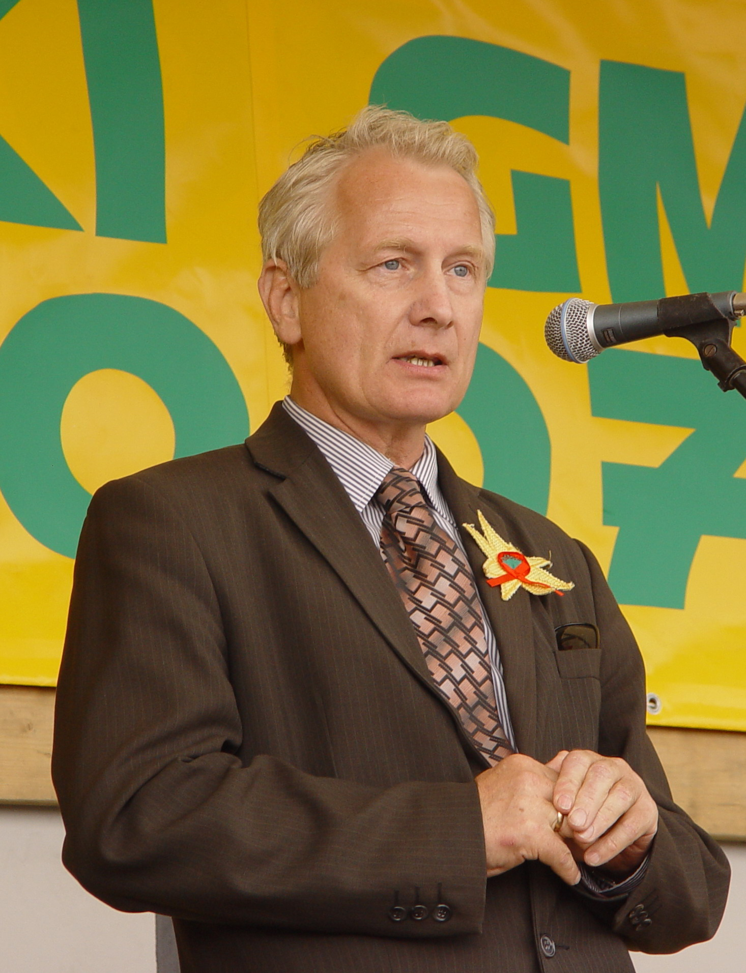 Nowy Folwark, Dożynki 2007, poseł Konstanty Miodowicz